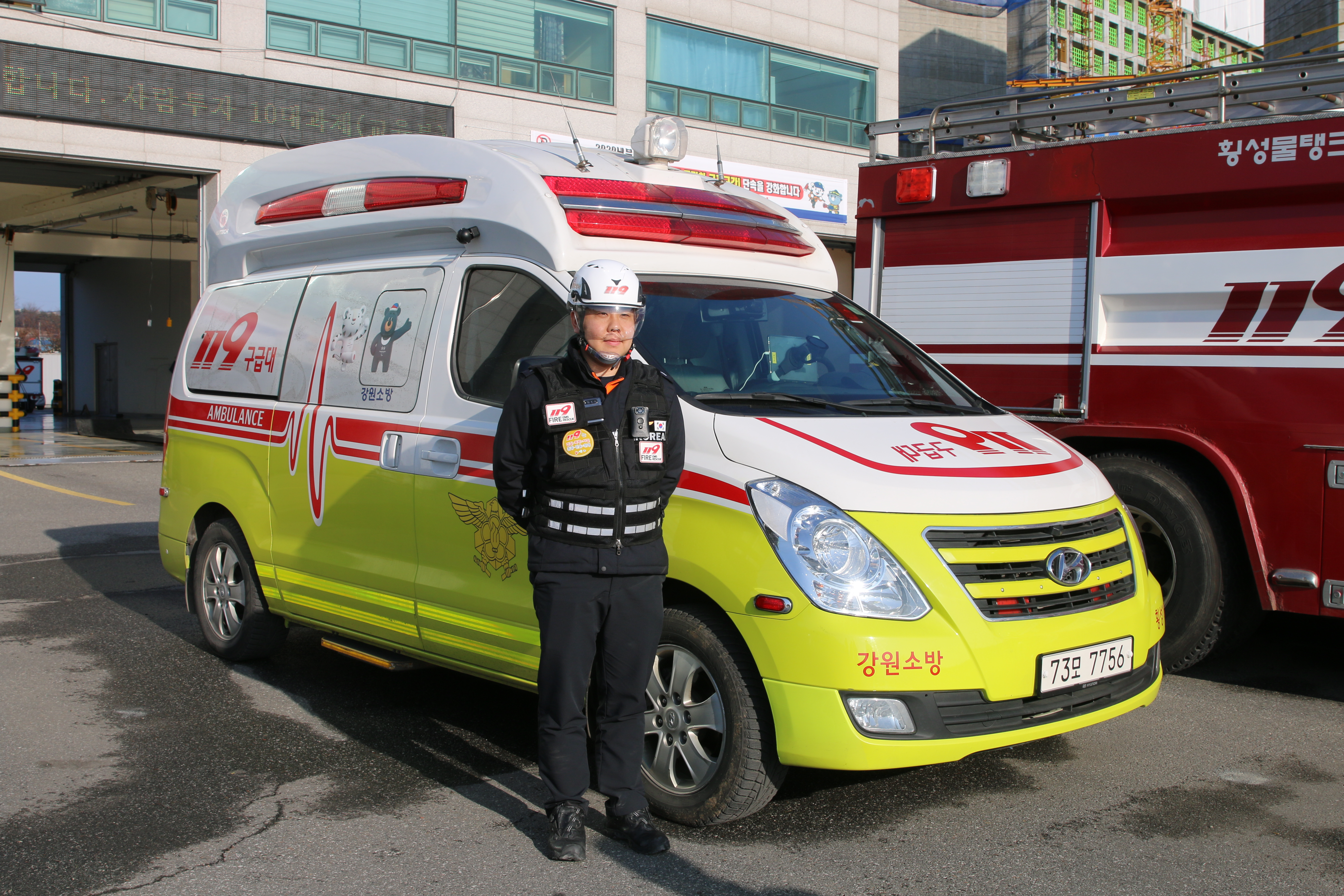 2020년 우즈베키스탄 kun.uz 기자 Feruza Avazova Alisherovna 횡성소방서 취재